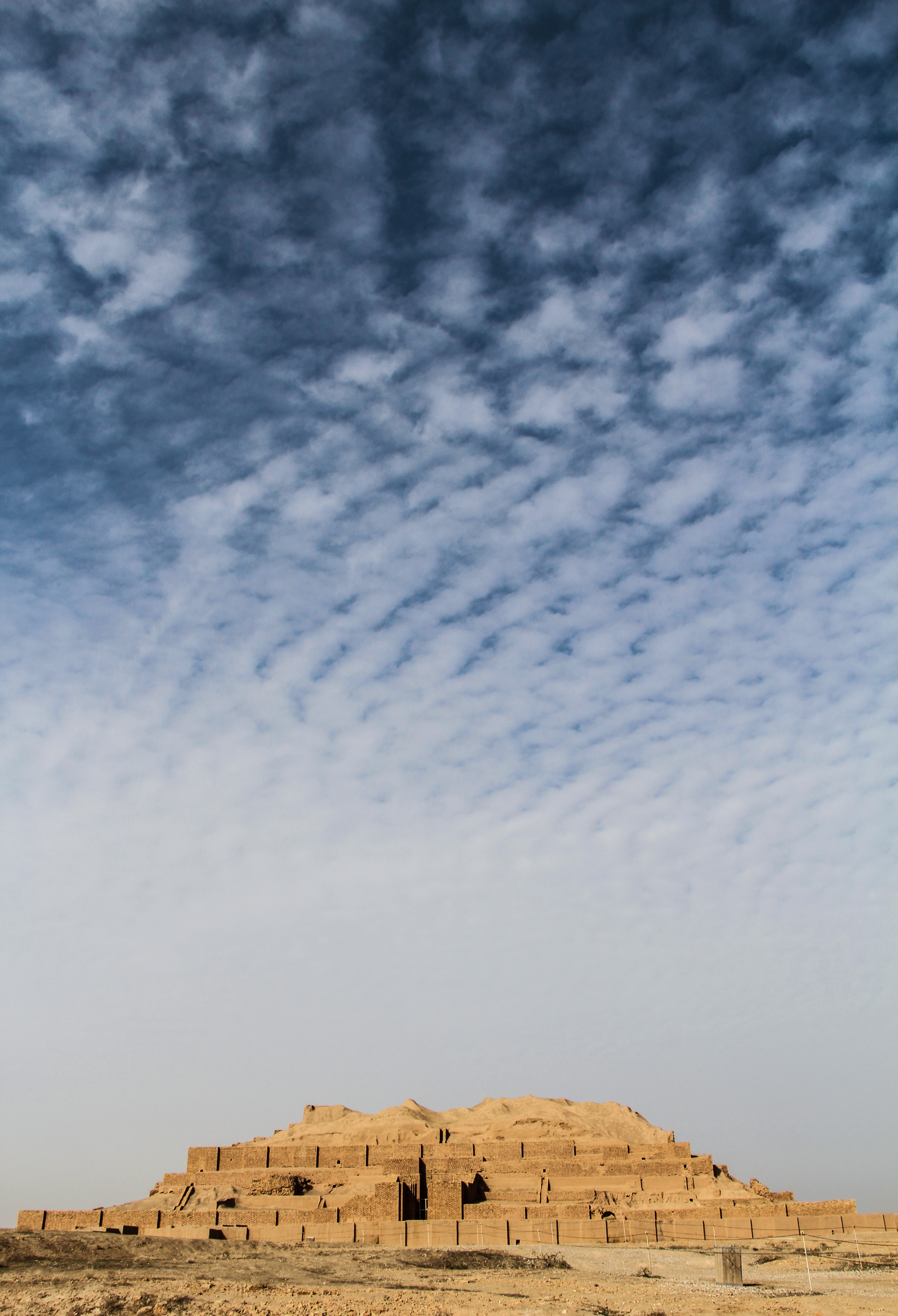 معبد چغا زنبیل/ زیگورات چغا زنبیل